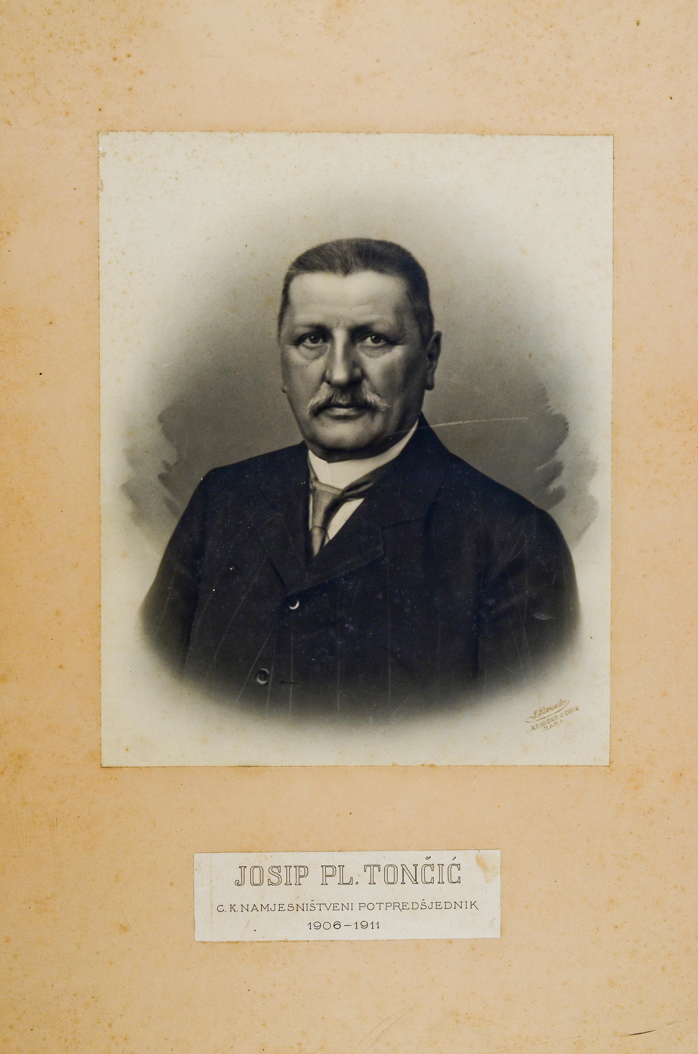 Josip Toncic 1906-1911 Staatsarchiv Zadar. Sammlung der Fotos und Bilder (HR-DAZD-385)